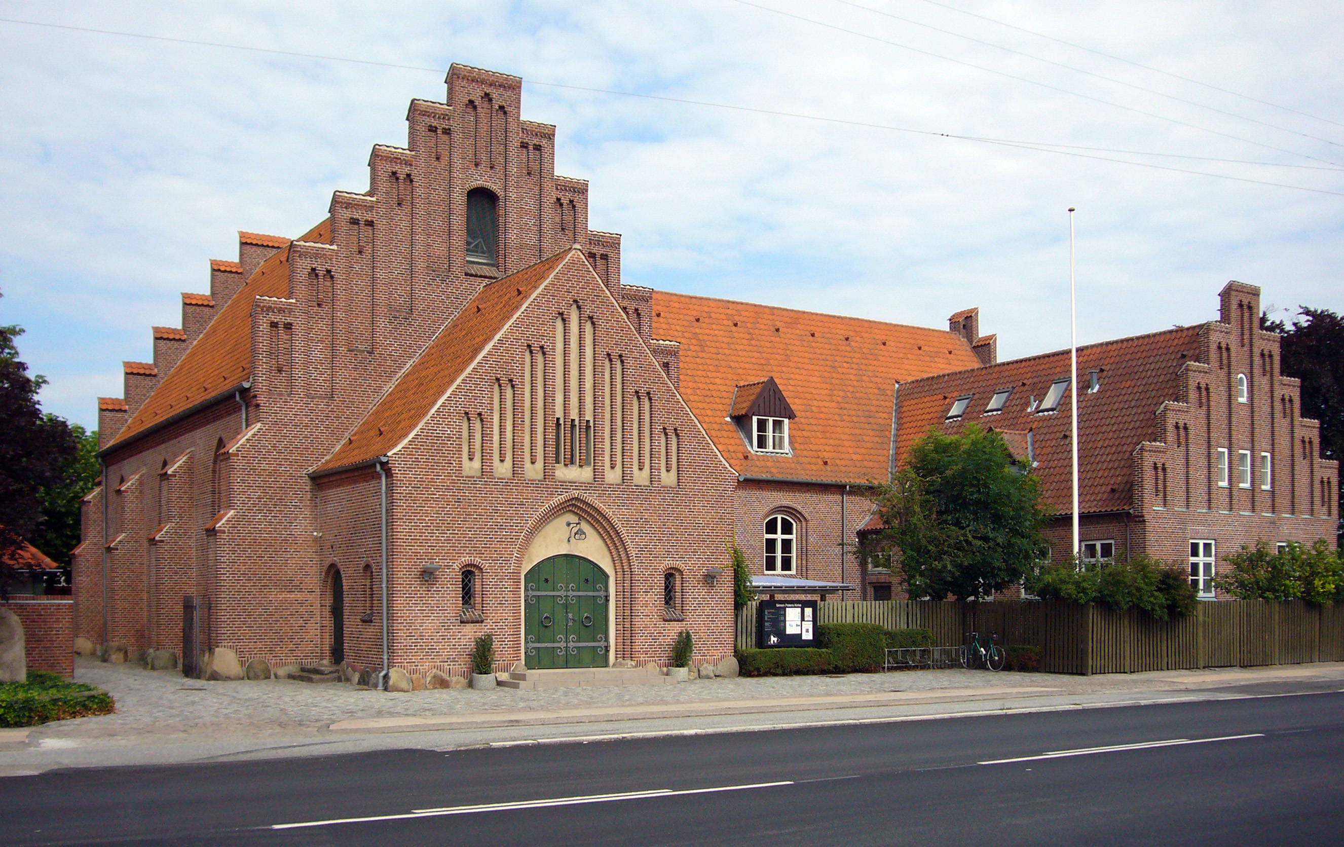 Simon Peters Kirke, Copenhagen, Denmark.